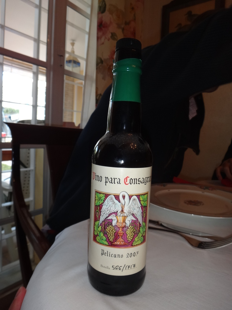 Vino Jerez para consagrar